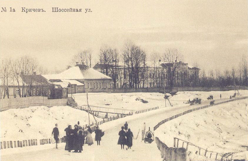 Беларуская (тарашкевіца): Крычаў (Kryčaŭ), вуліца Шашэйная (vulica Šašejnaja). Палац Пацёмкіна і Галынскіх